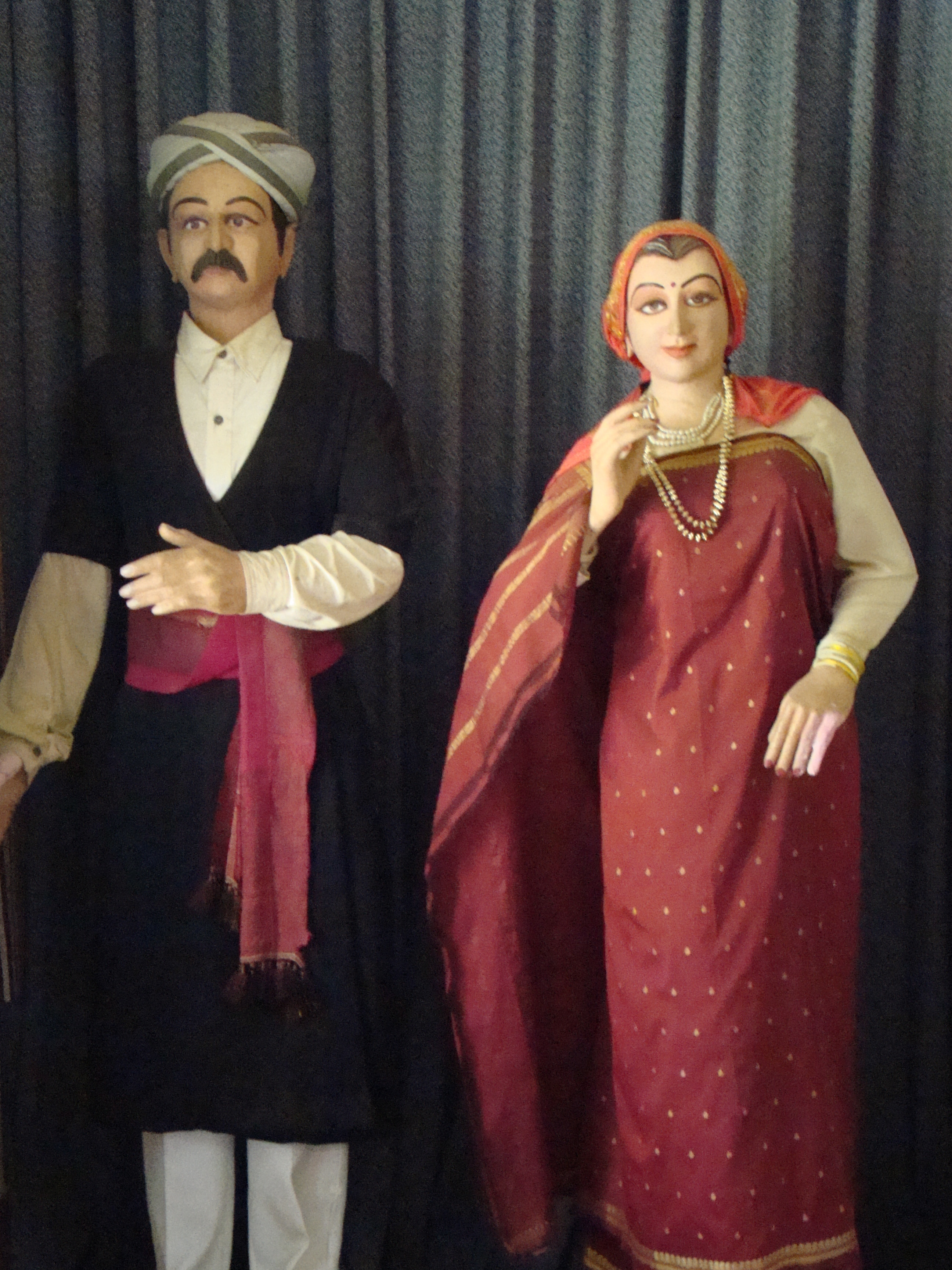 Coorgi Dress